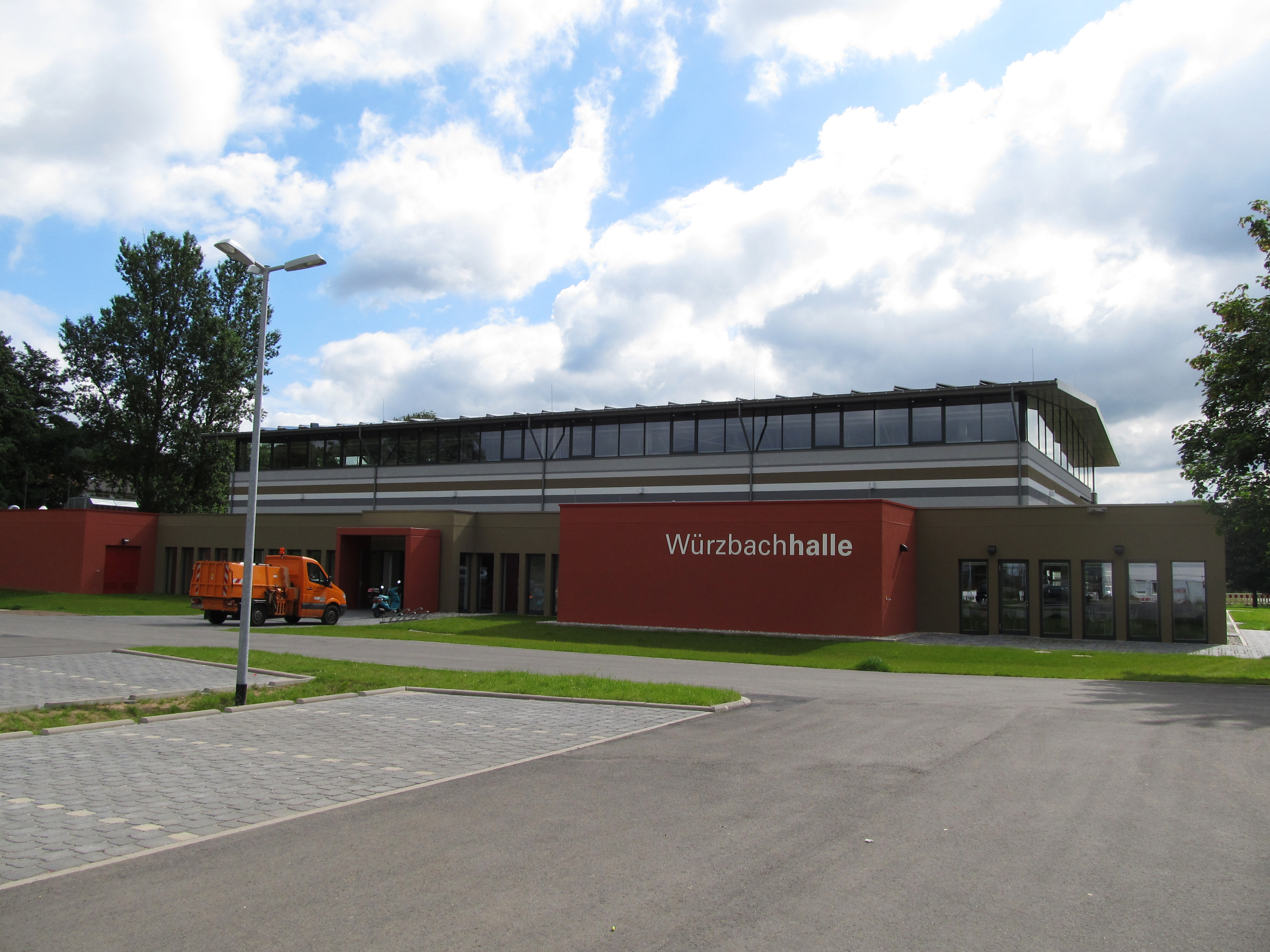 Die neue Würzbachhalle in Niederwürzbach, einem Stadtteil von Blieskastel, Saarland